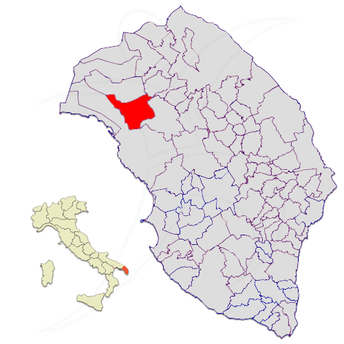 Il territorio del comune di Leverano nella provincia di Lecce